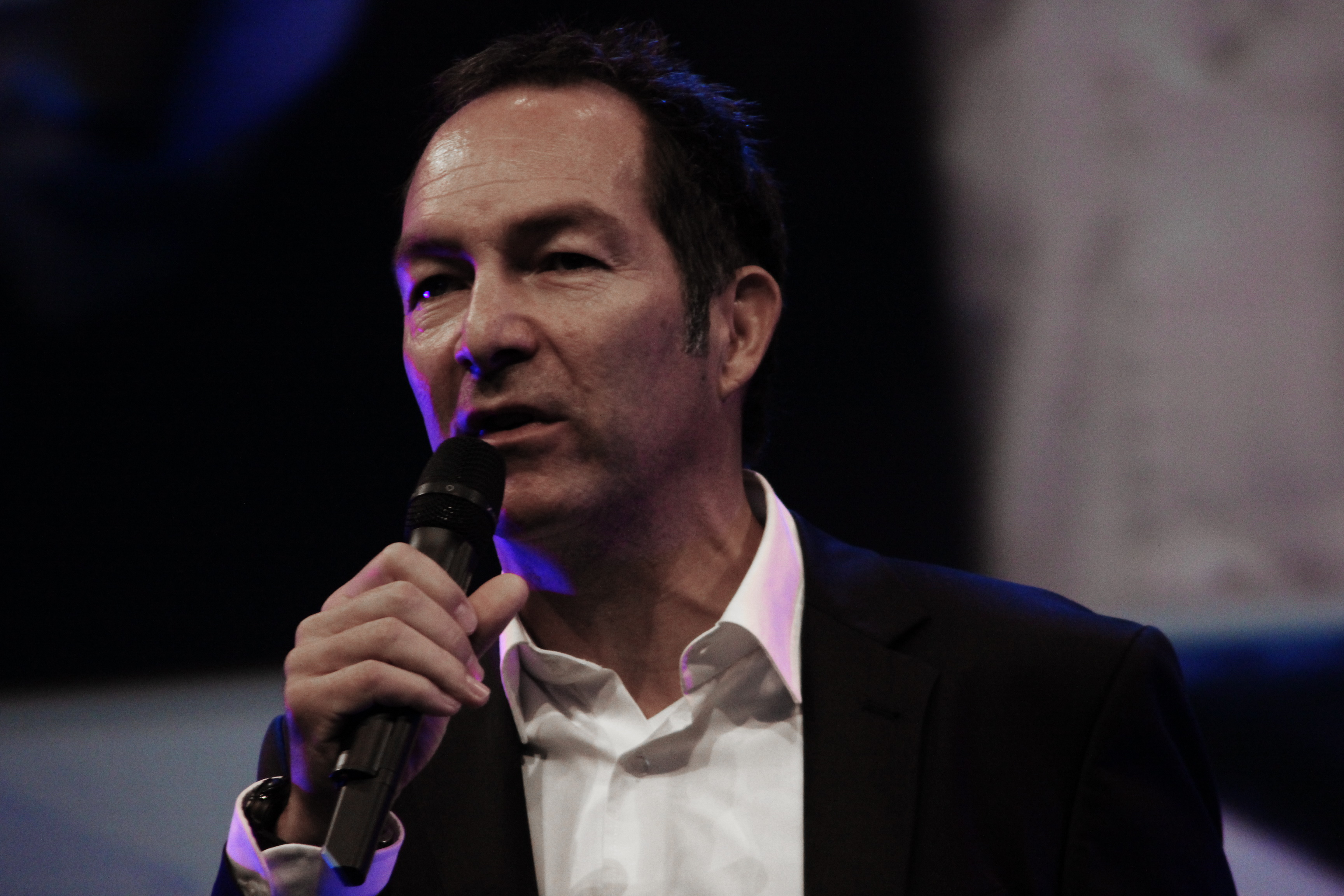 Moderator beim Event "5 Jahre BMW Welt"